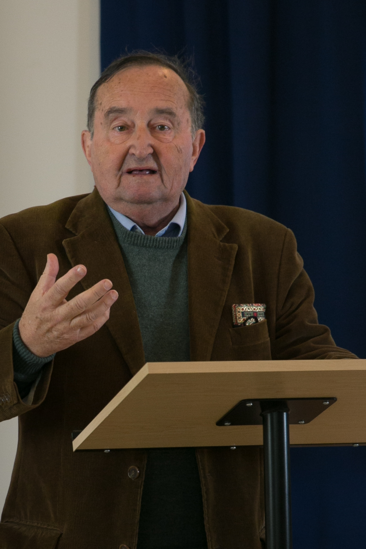 Renato Corsetti prelegas dum la 44a Malferma Tago en la Centra Oficejo de Universala Esperanto-Asocio